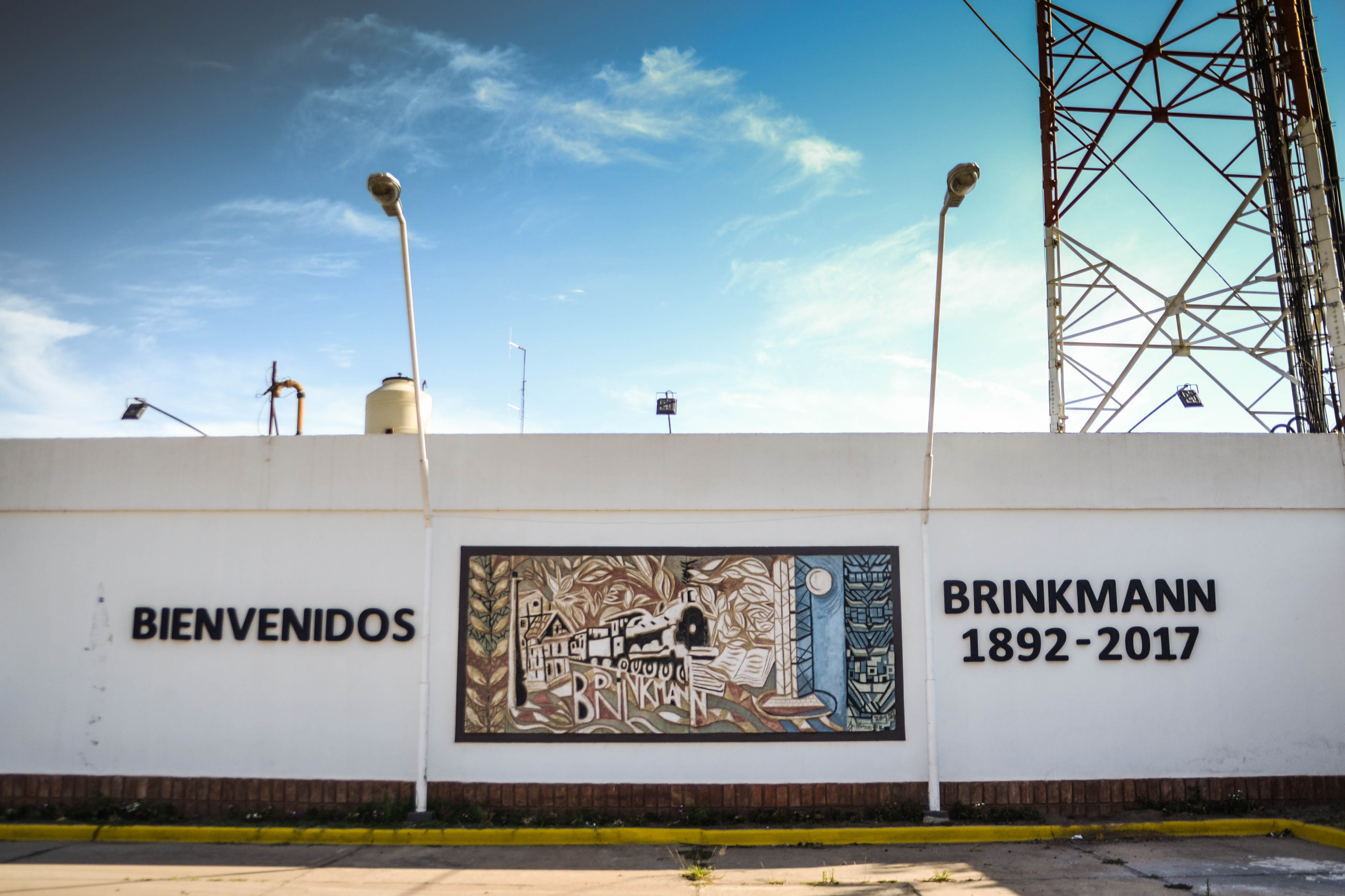 Mural en Estación de colectivos - Ciudad de Brinkmann - Cordoba